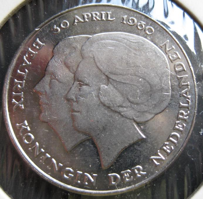 Nederlandse rijksdaalder uit 1980, ter gelegenheid van de troonswisseling Juliana-Beatrix.